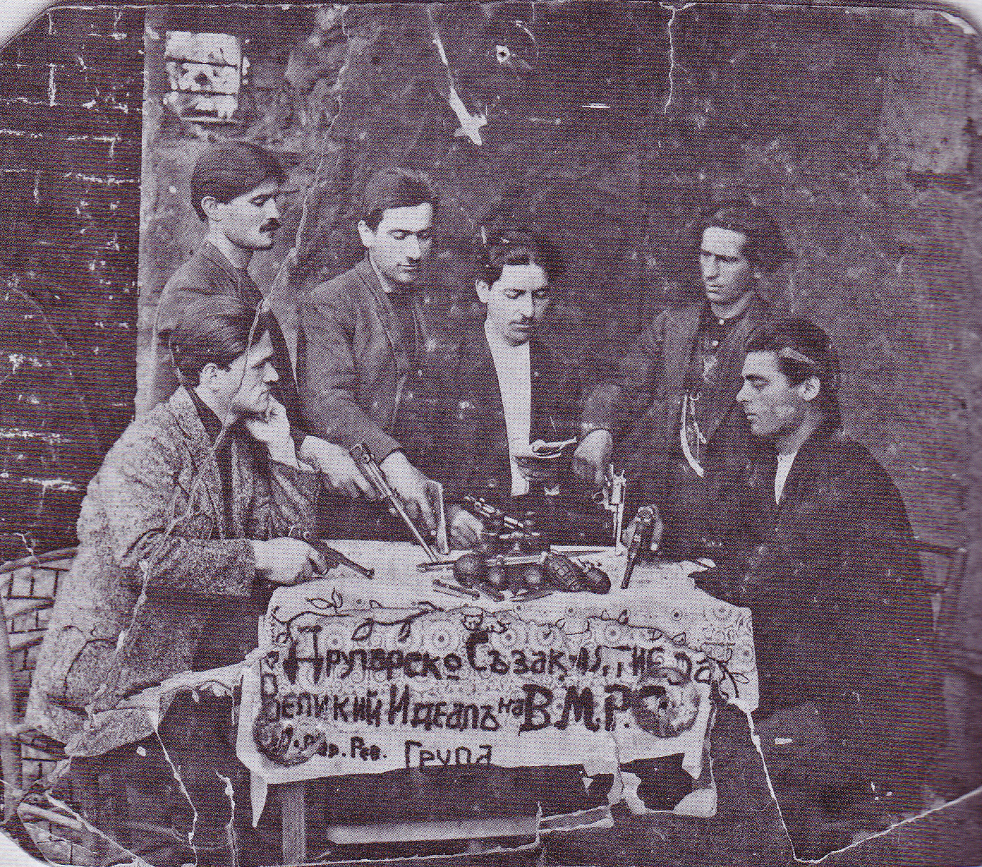 Boris Izvorski cheta